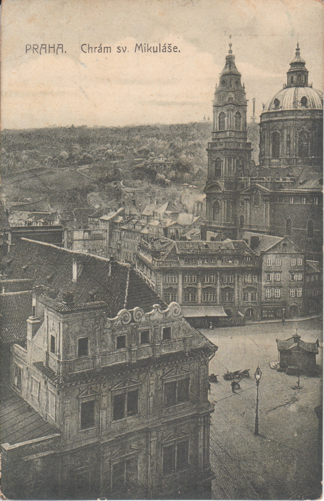 Praha. Chrám sv. Mikuláše, Stará Praha, nakl. F. J. Jedlička, Praha I.-339, Čís. 20